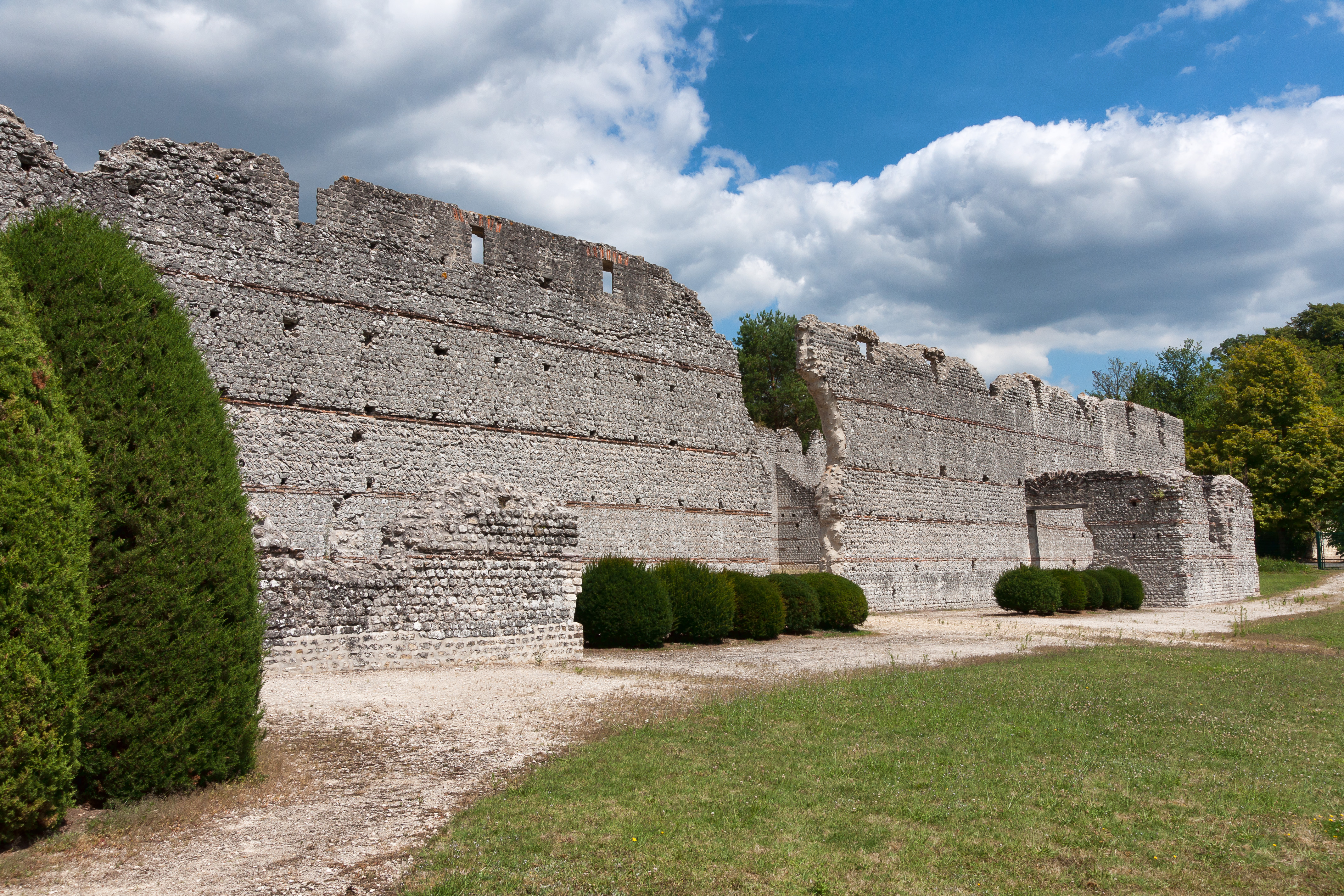 Bâtiment des Maselles, ruines gallo-romaines à Thésée (Loir-et-Cher, France)